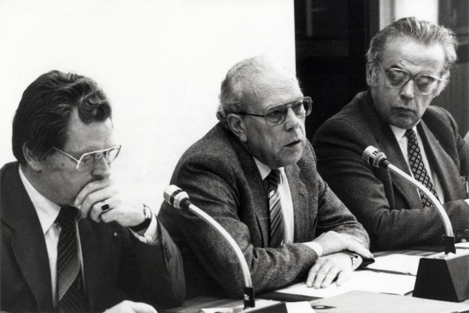 Hermsen, B.J.M. (KVP). Voorzitter Hermsen (rechts) van de Vaste Kamercommissie voor Sociale Zaken tijdens een vergadering van de commissie over een eventuele uitkering ineens aan gezinnen met een minimum inkomen. (verder: links Staatssecretaris De Graaf, en in het midden Minister Albeda). Nederland, Den Haag, 2 oktober1980.